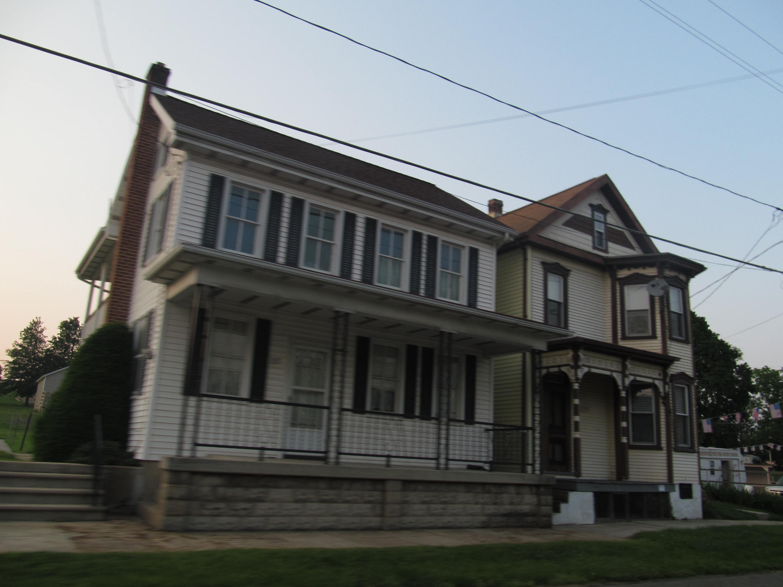 Friedensburg, Pennsylvania